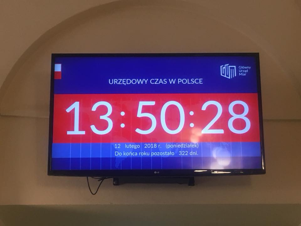 Zegar wskazujący czas urzędowy w Polsce